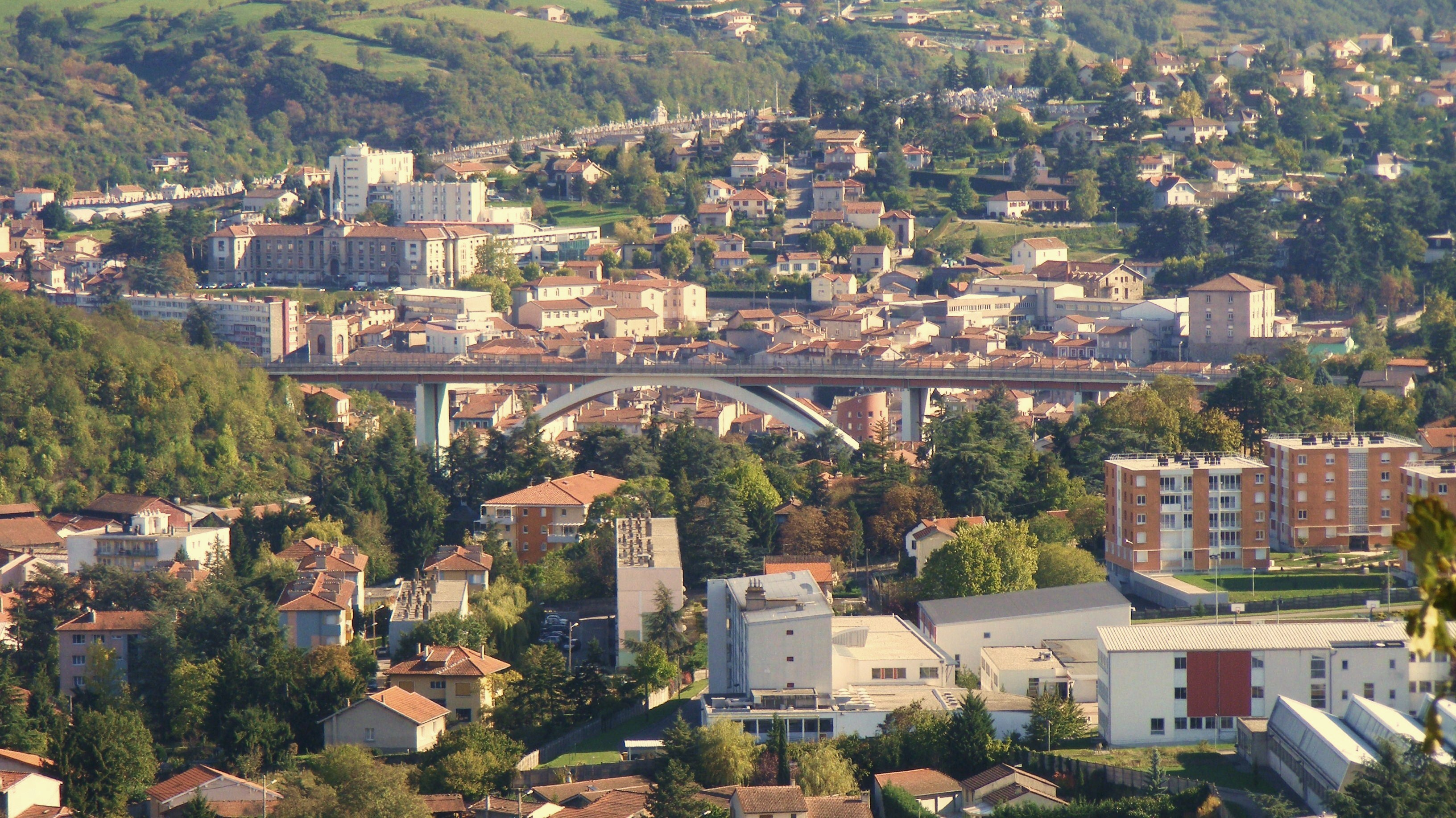 Vue générale du nord-ouest